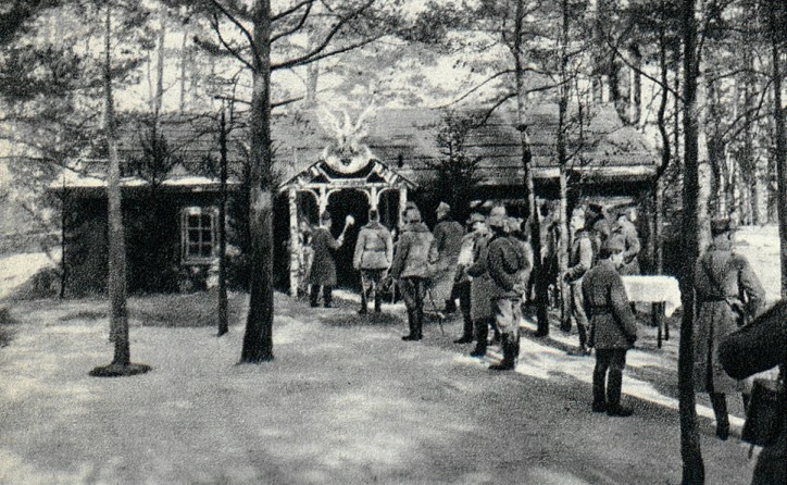 Poświęcenie kwatery komendy III Brygady Legionów Polskich. Nowe Kukle.